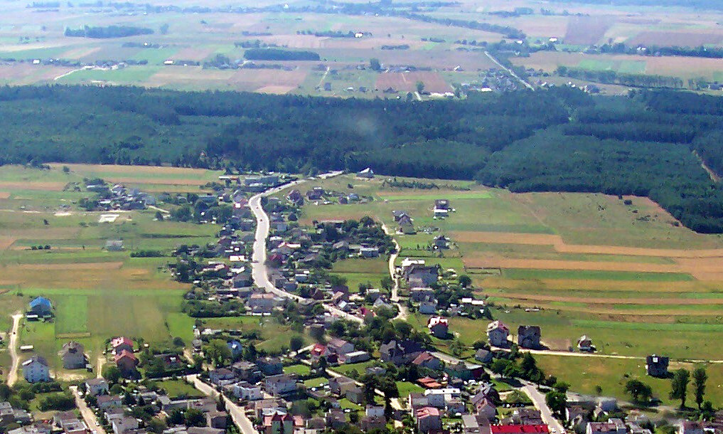 Jastrzębia Góra z lotu ptaka